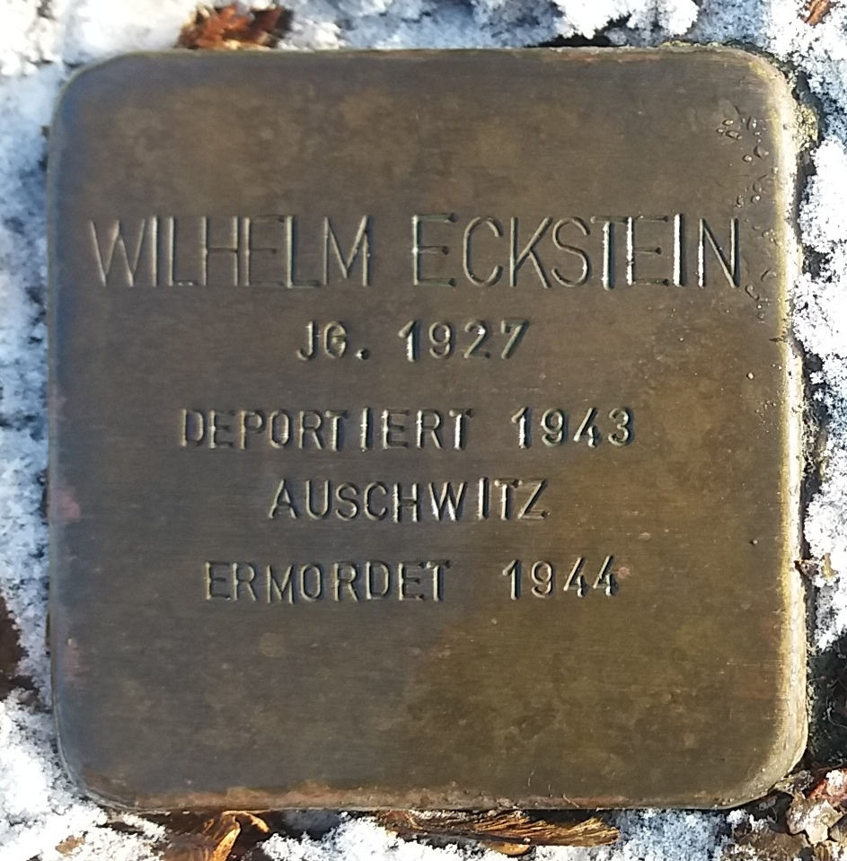 Stolperstein für Wilhelm Eckstein, Mitglied der Großfamilie Eckstein, Vöhringen (Iller)